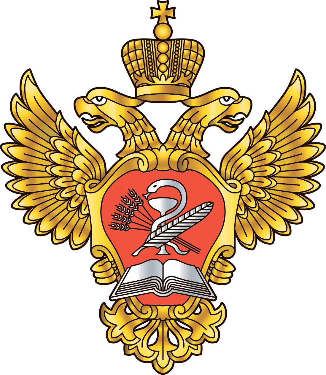 Эмблема Федерального агентства научных организаций